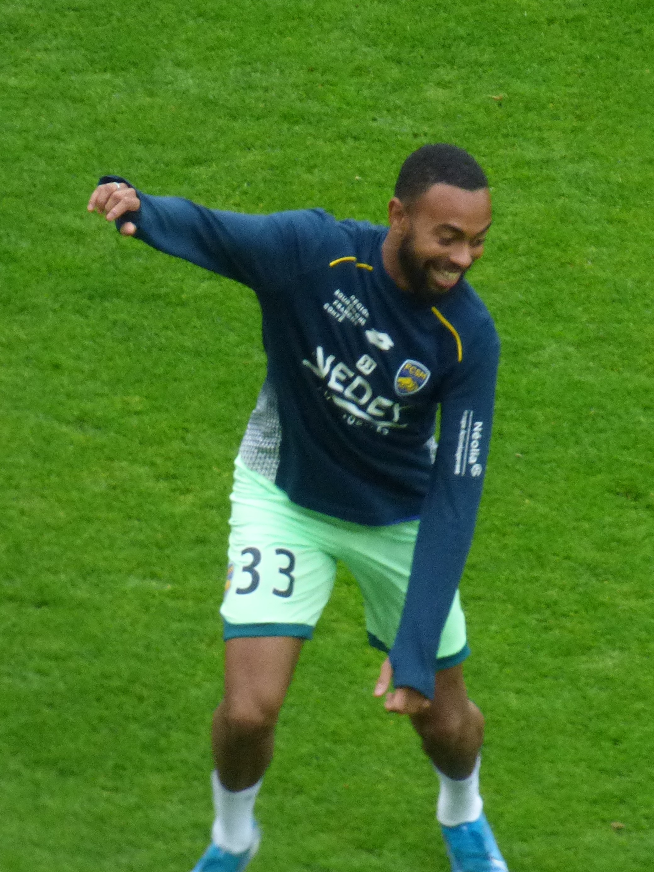 Melvin Sitti avant le match RC Lens / FC Sochaux, comptant pour la quinzième journée du championnat de France de Ligue 2 de football 2019-2020, le 23 novembre 2019, au Stade Bollaert-Delelis.